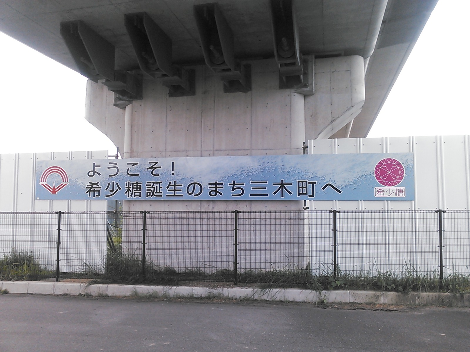 三木町「希少糖誕生の町」看板。さぬき三木インターチェンジ前にて。投稿者自身による撮影。